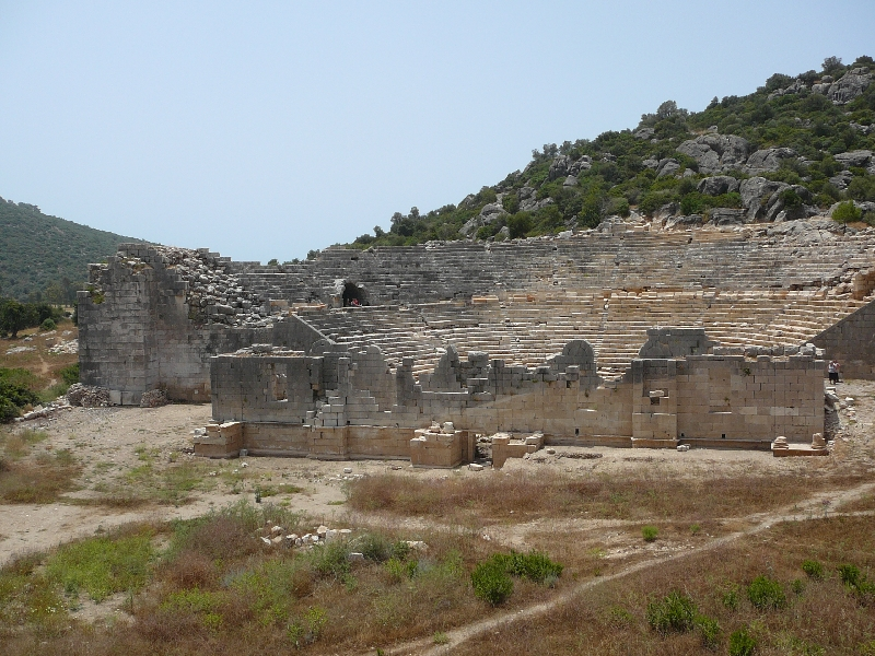 Das große Theater des antiken Patara, an der rechten Außenmauer (Hell/Dunkelgrenze) ist deutlich sichtbar, wie hoch bis zur Ausgrabung der Dünensand lag.